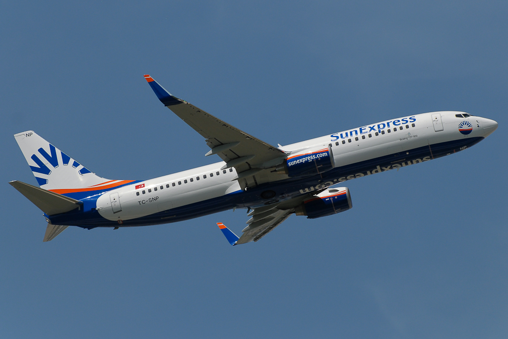 SunExpress B737 startet in München